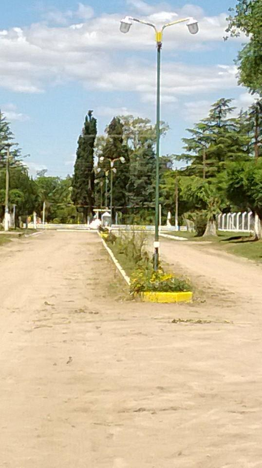 Calle principal